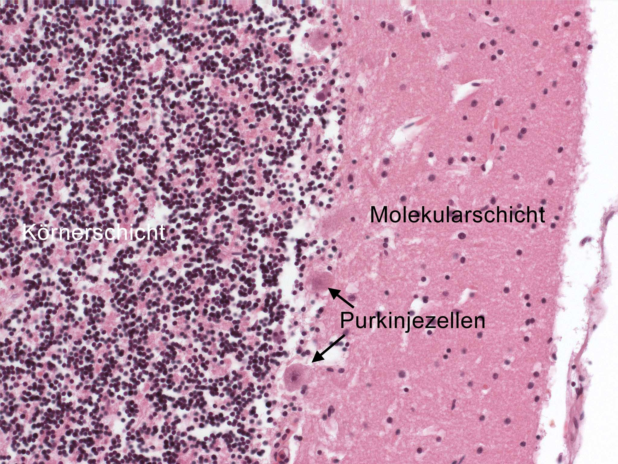 Cerebellum H&E Staining